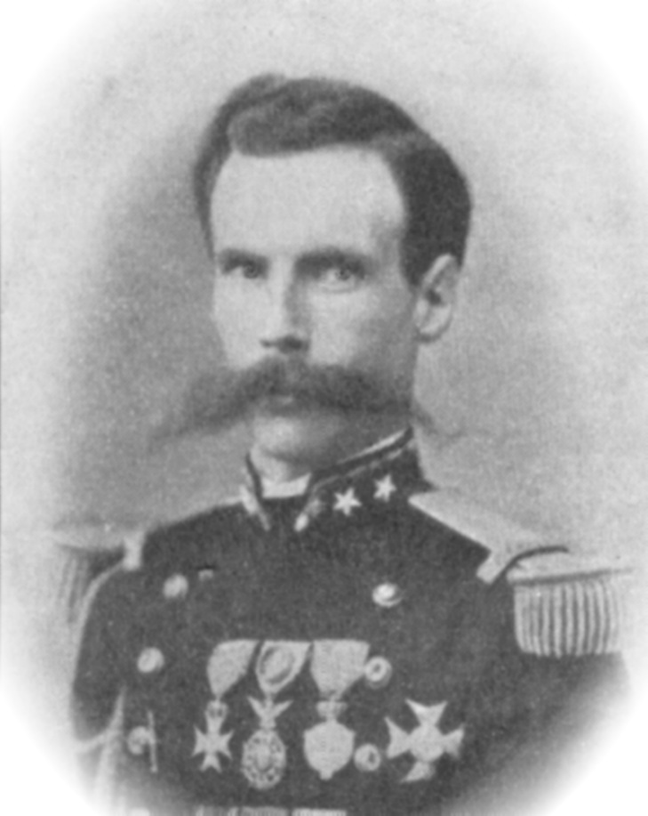 Description